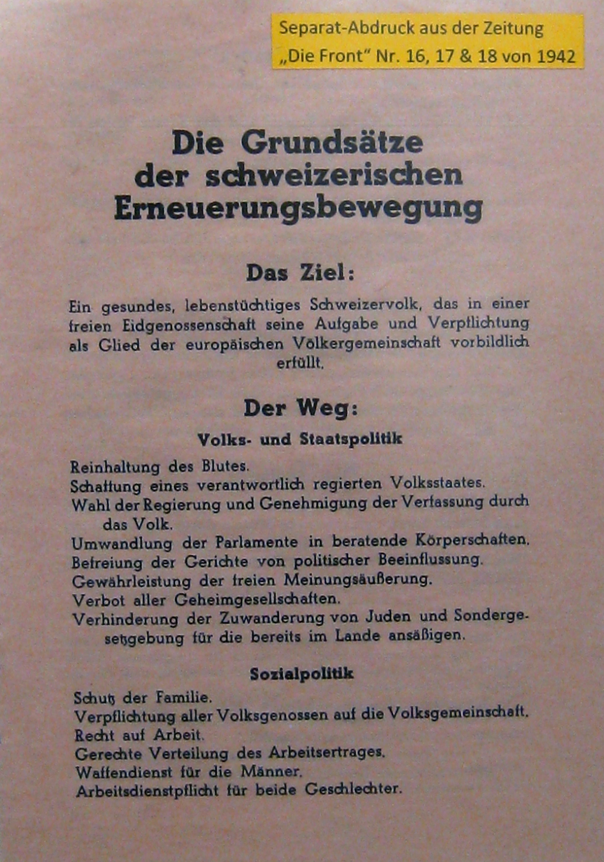 Frontisten-Flugblatt 1942 im Festungsmuseum Reuenthal